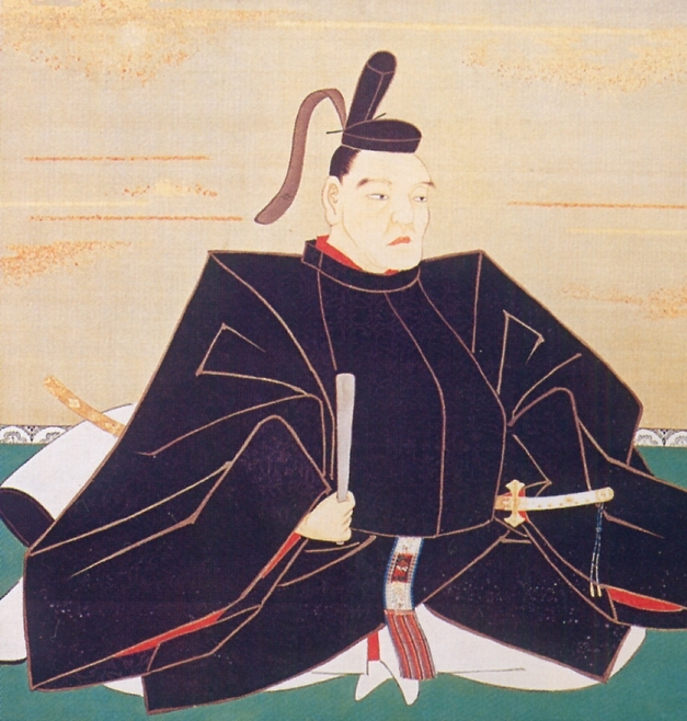 柳沢吉保 Yanagisawa Yoshiyasu. 柳沢吉保が祖先が建立した一蓮寺に奉納する為に狩野常信に命じて描かせた肖像画。